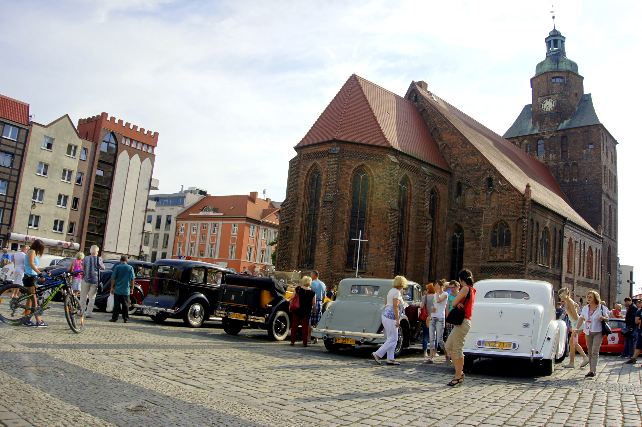 Gorzów Wlkp., Stary Rynek. Wizyta uczestników zlotu zabytkowych samochodów. ( VI Międzynarodowy Zlot Samochodów Rolls Royce & Bentley - Mierzęcin 2015 )